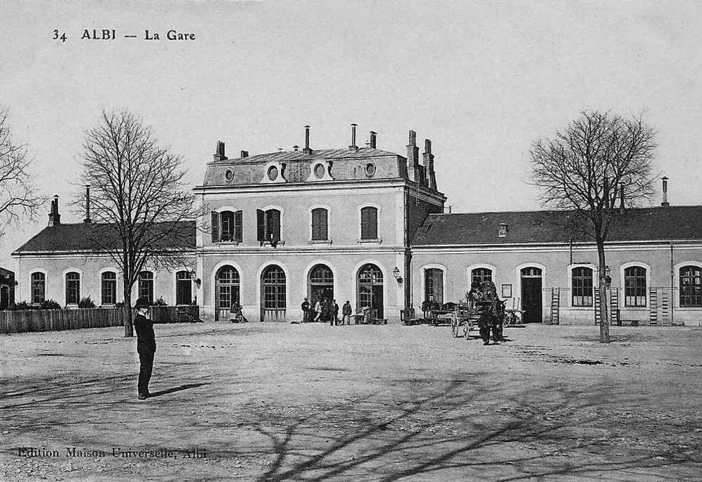 Le bâtiment voyageurs de la gare d'Albi-Orléans, vers 1900, renommée depuis en gare d'Albi-Ville.